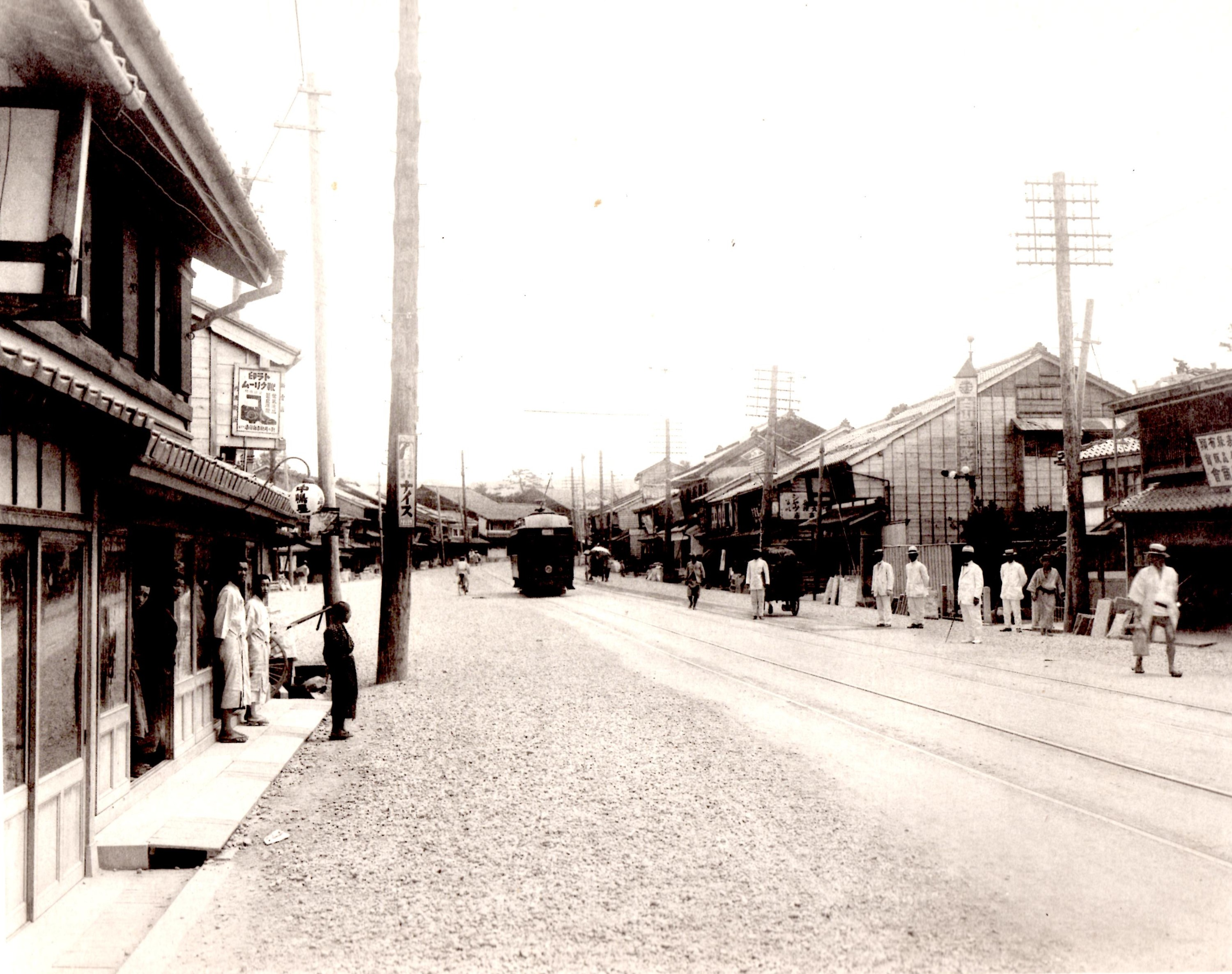 原題は「開通以後の白銀町通より安江町通を望む光景」。大正8年7月20日撮影。